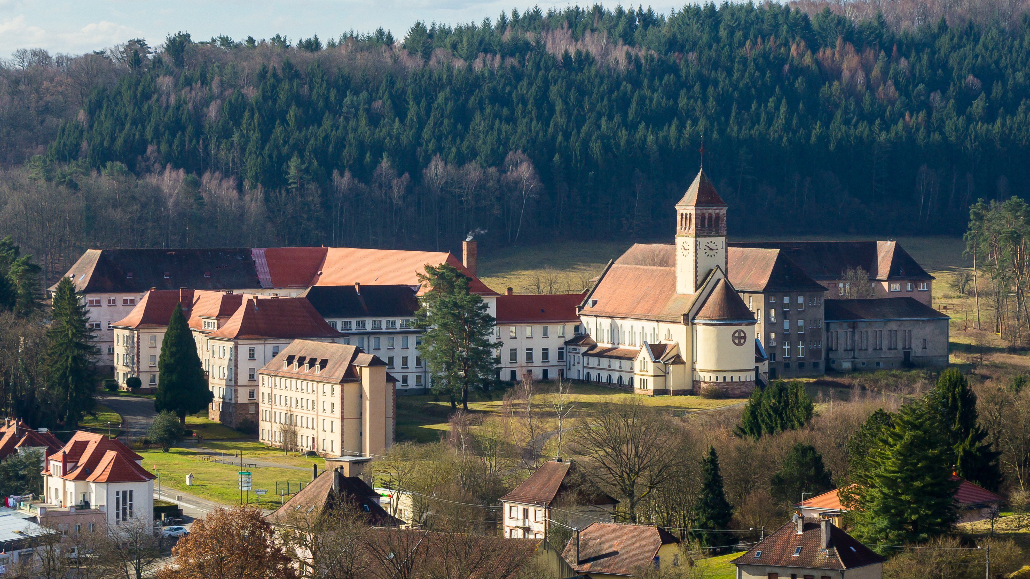 Collège Saint-Augustin de Bitche